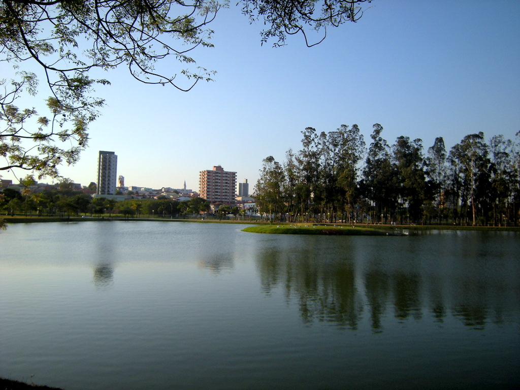 Parque dos Ipês, em Santa Bárbara d'Oeste, SP.